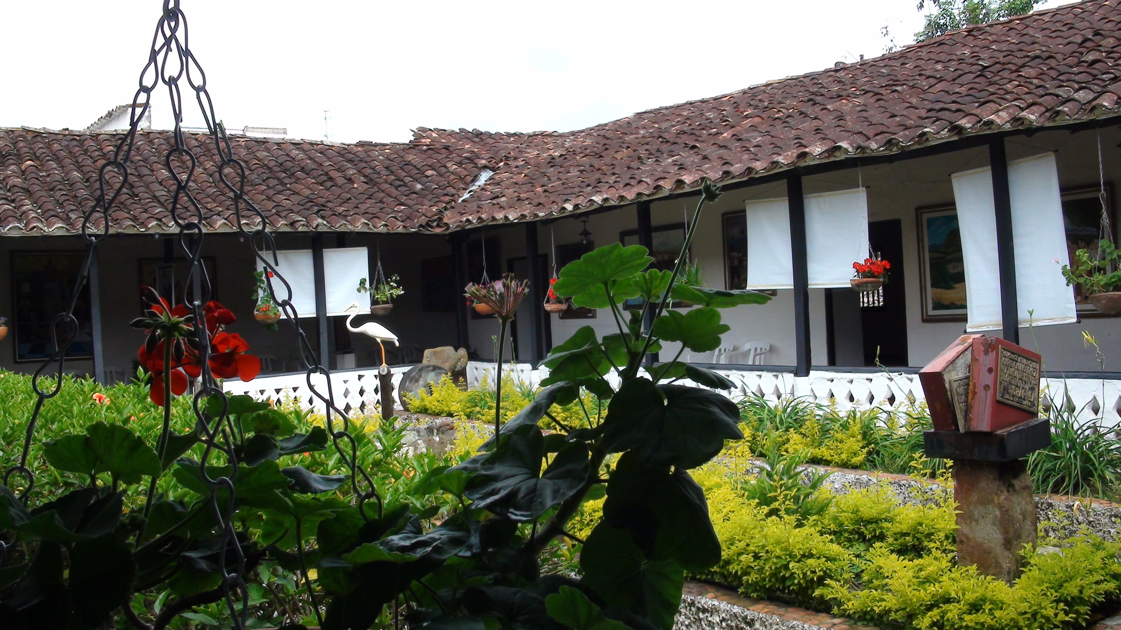 Respira la memoria en la Casa de la Cultura de Charalá, municipio del Departamento de Santander, Colombia.